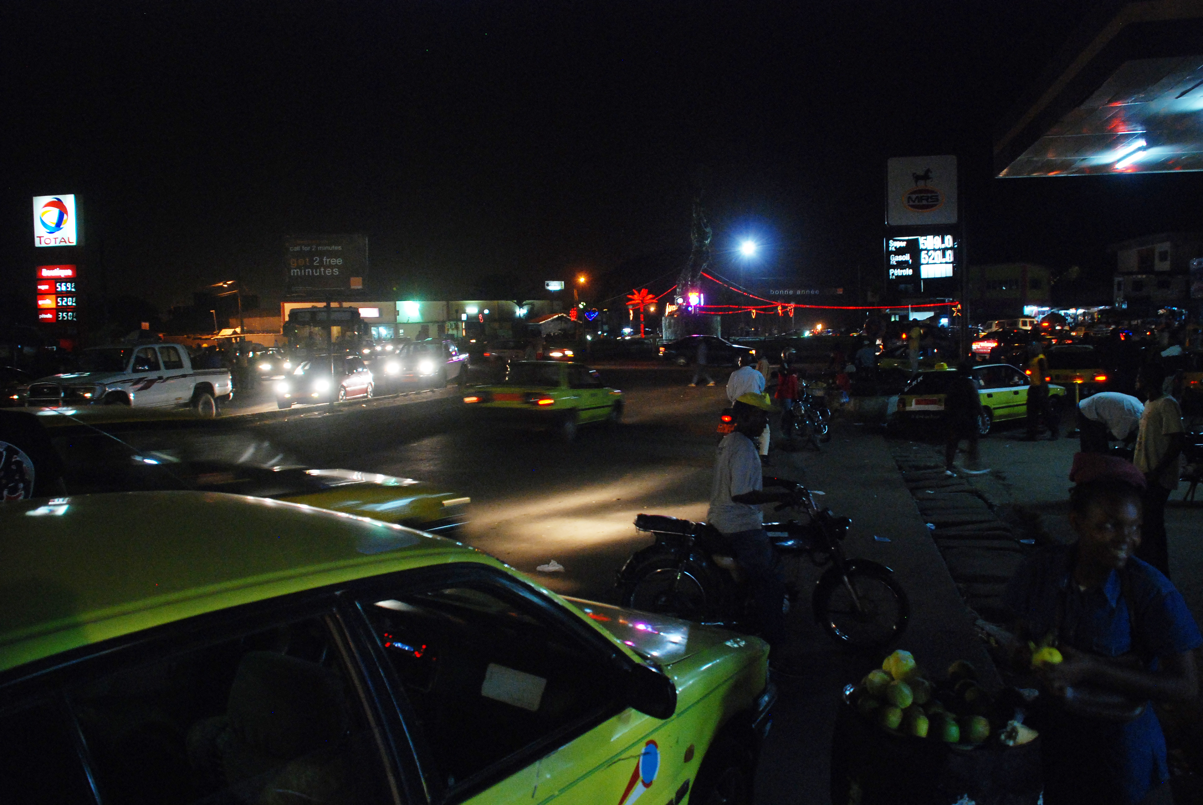 circulation nocturne dans une rue de Douala au Cameroun. This is an image with the theme "Africa on the Move or Transport" from: Cameroon